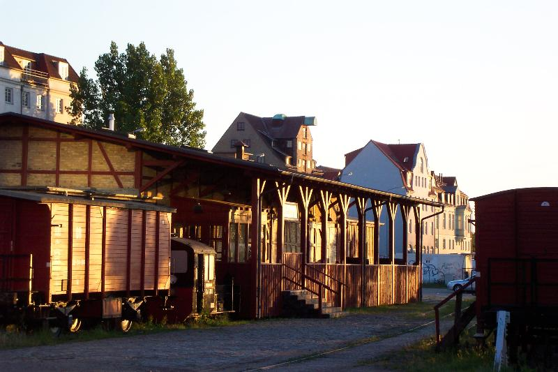 historischer Lokschuppen im Rostocker Stadthafen